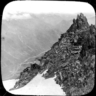 Fonds Trutat - Photographie ancienne Cote : TRU C 2752 Localisation : Fonds ancien (S 30) Original non communicable Titre : Ascension au Mont-Blanc, rocher des Grands-Mulets, vallée de Chamonix Auteur : Trutat, Eugène Rôle de l’auteur : Photographe Lieu de création : Chamonix (Haute-Savoie ; canton) Date de création : 1859-1910 [entre] Mesures : : 8,5 x 10 cm Observations : Inscription sur la plaque : Rocher des Grands-Mulets et vallée de Chamonix, ascension au Mont-Blanc. Mot(s)-clé(s) : -- Alpinisme -- Glacier -- Sommet (montagne) -- Montagne -- Neige -- Glace -- Rocher -- Vallée -- Versant rocheux -- Haute-Savoie (Rhône-Alpes) -- Rhône-Alpes (France) -- Alpes (France) -- Chamonix (Haute-Savoie ; canton) -- Vallée de Chamonix (France) -- Les Grands Mulets (Mont Blanc) -- Mont Blanc (France ; massif) -- 19e siècle, 2e moitié -- 20e siècle, 1e quart Médium : Photographies -- Positifs sur plaque de verre -- Noir et blanc -- Paysages de montagne -- Détourage au papier collé Voir : TRU C 1517 Passage à l'échelle du mur de glace avant les Bibliothèque de Toulouse. Domaine public